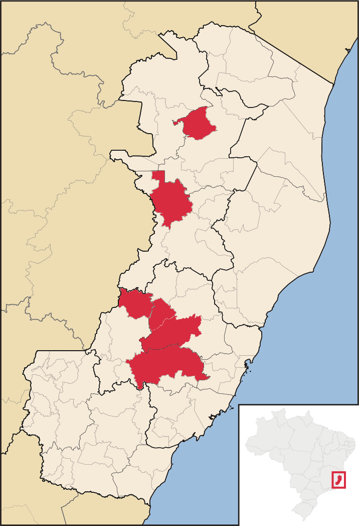 Gemeinden im Bundesstaat Espírito Santo, da Deutsch („Pommersch“) Co-Amtssprache ist (März 2019): Domingos Martins, Itarana, Laranja da Terra, Pancas, Santa Maria de Jetibá und Vila Pavão.